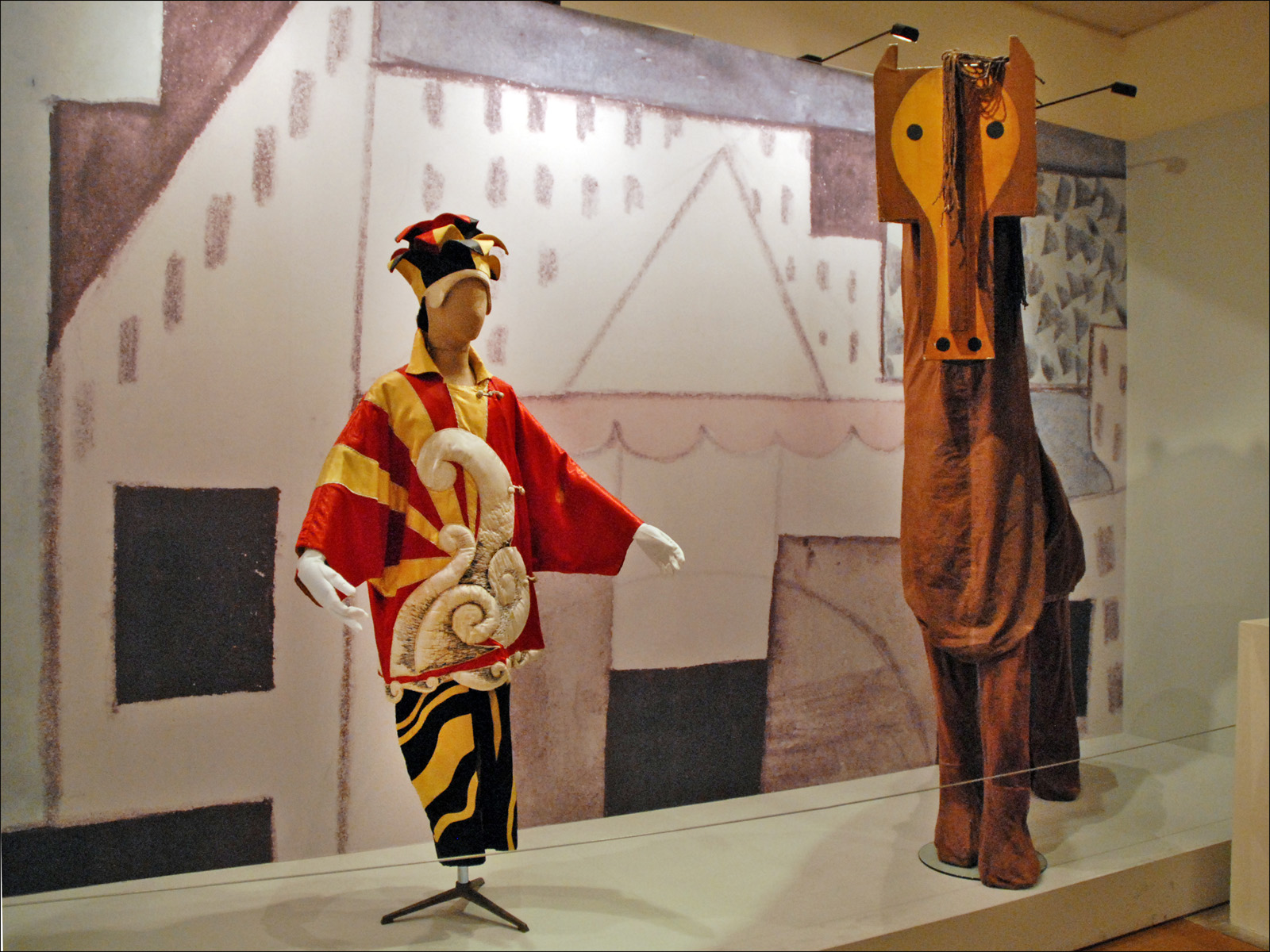 D'après Pablo Picasso Costume pour le prestidigitateur chinois Costume pour le cheval Parade (1917) Répertoire de la compagnie des Ballets russes dirigée par Serge Diaghilev Argument : Jean Cocteau Musique : Eric Satie Décors et costumes : Pablo Picasso Chorégraphie originale : Léonide Massine Exposition Ballets russes Bibliothèque-musée de l'Opéra de Paris